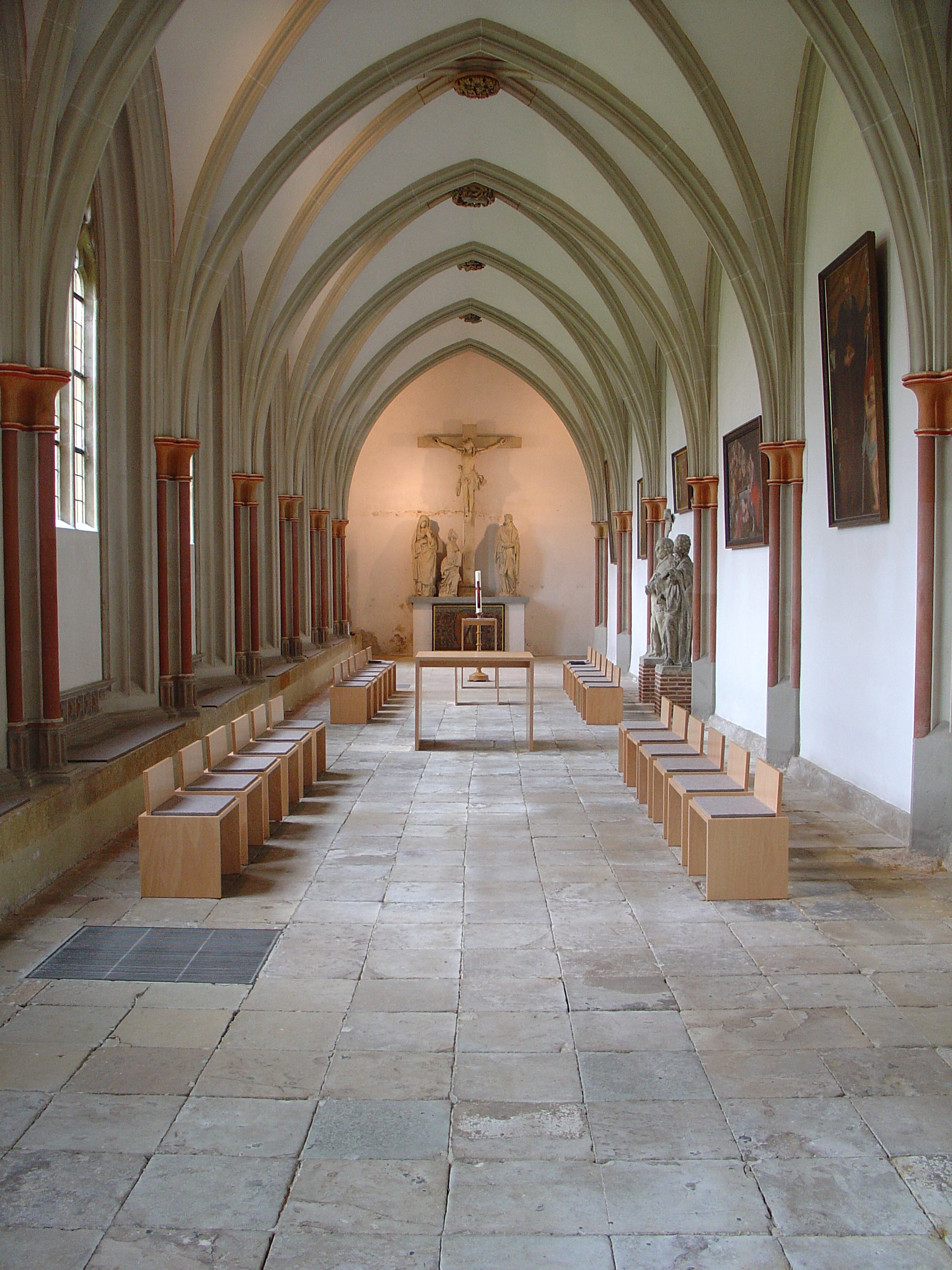 Teil des ehemaligen Kreuzgangs im Kloster Marienfeld